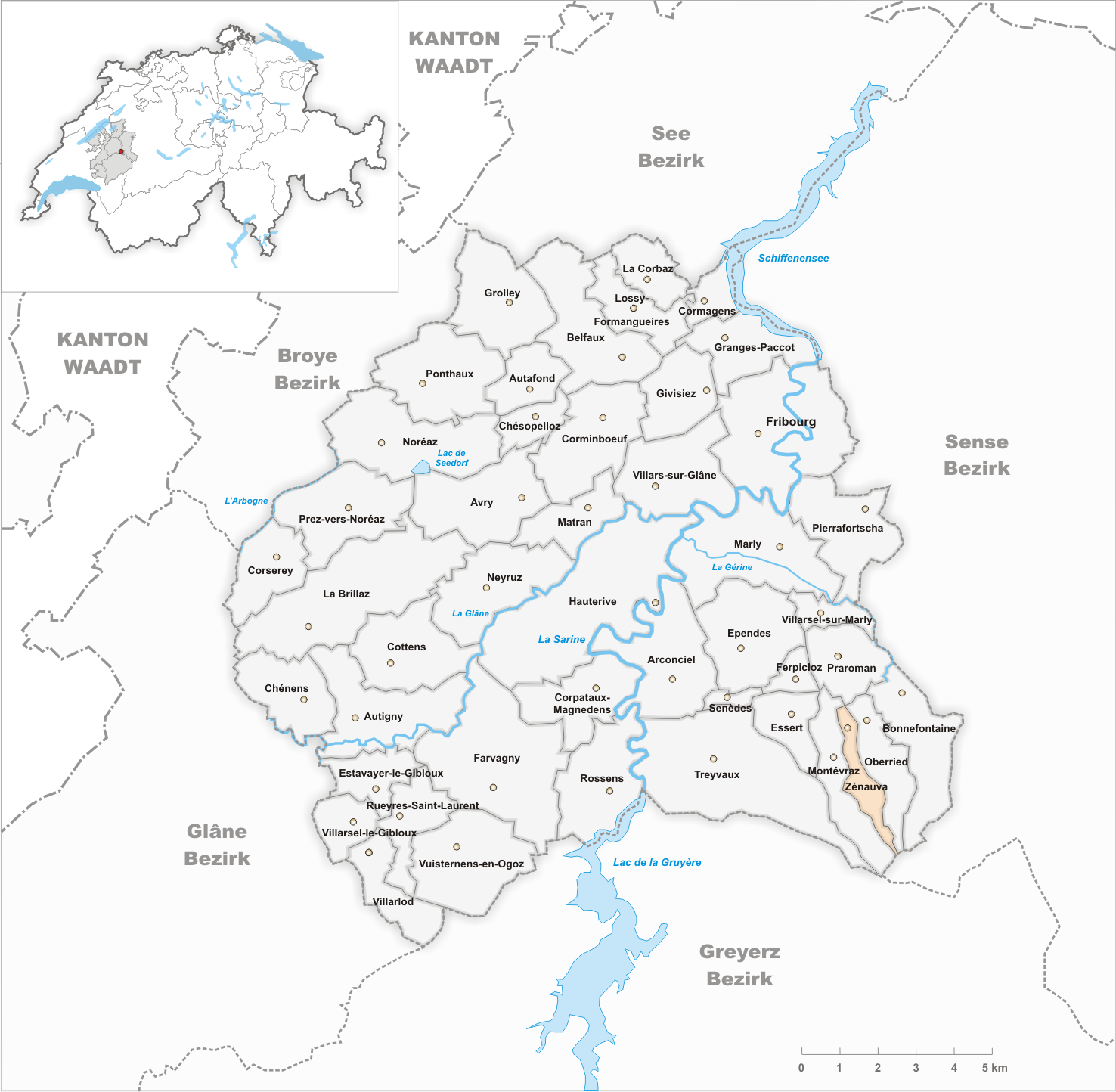 Municipality Zénauva Artist: Tschubby